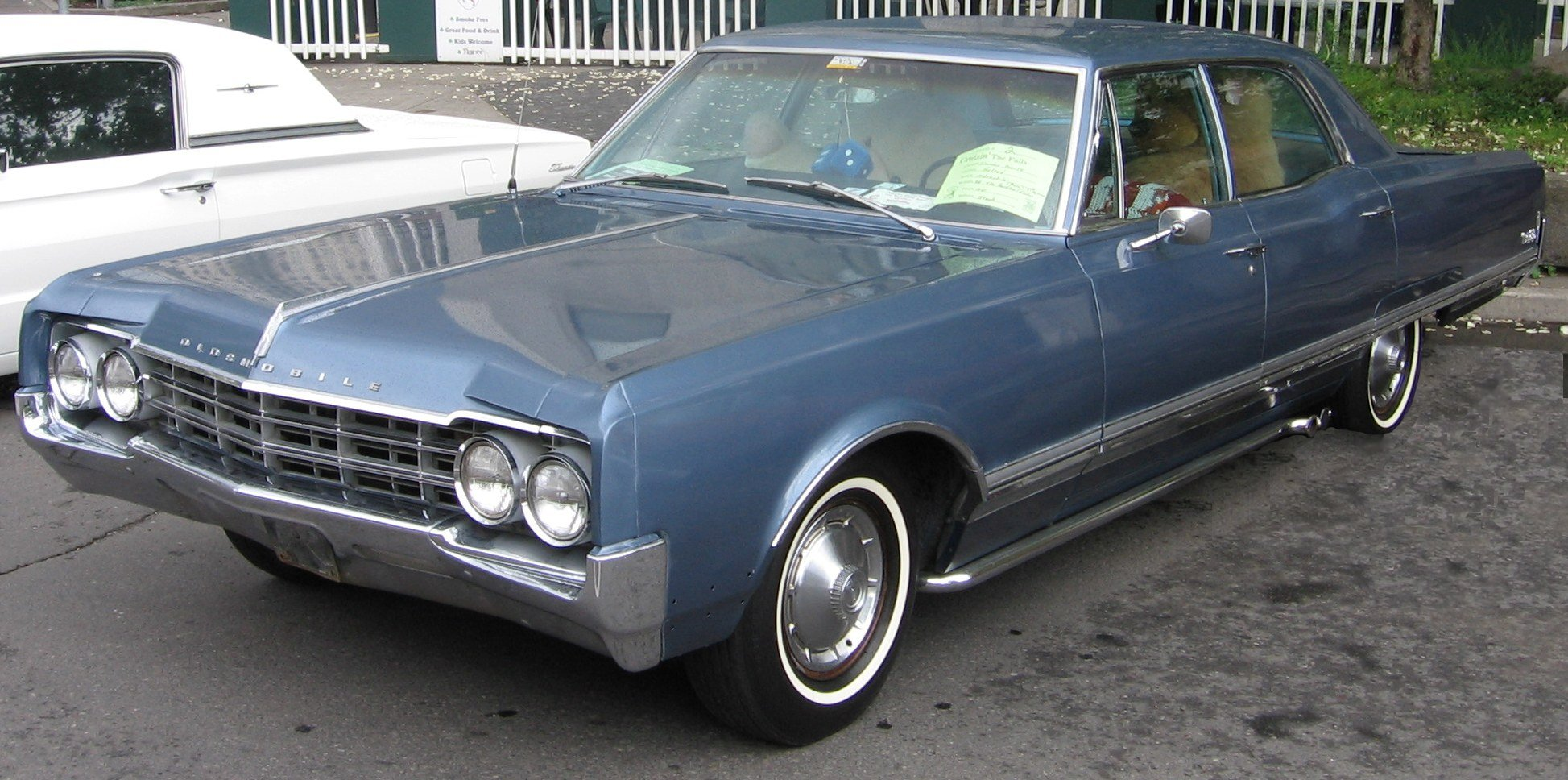 1965 Oldsmobile 98 sedan